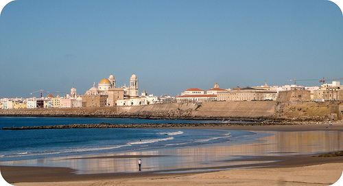 Playa de Santa María del Mar, Cádiz